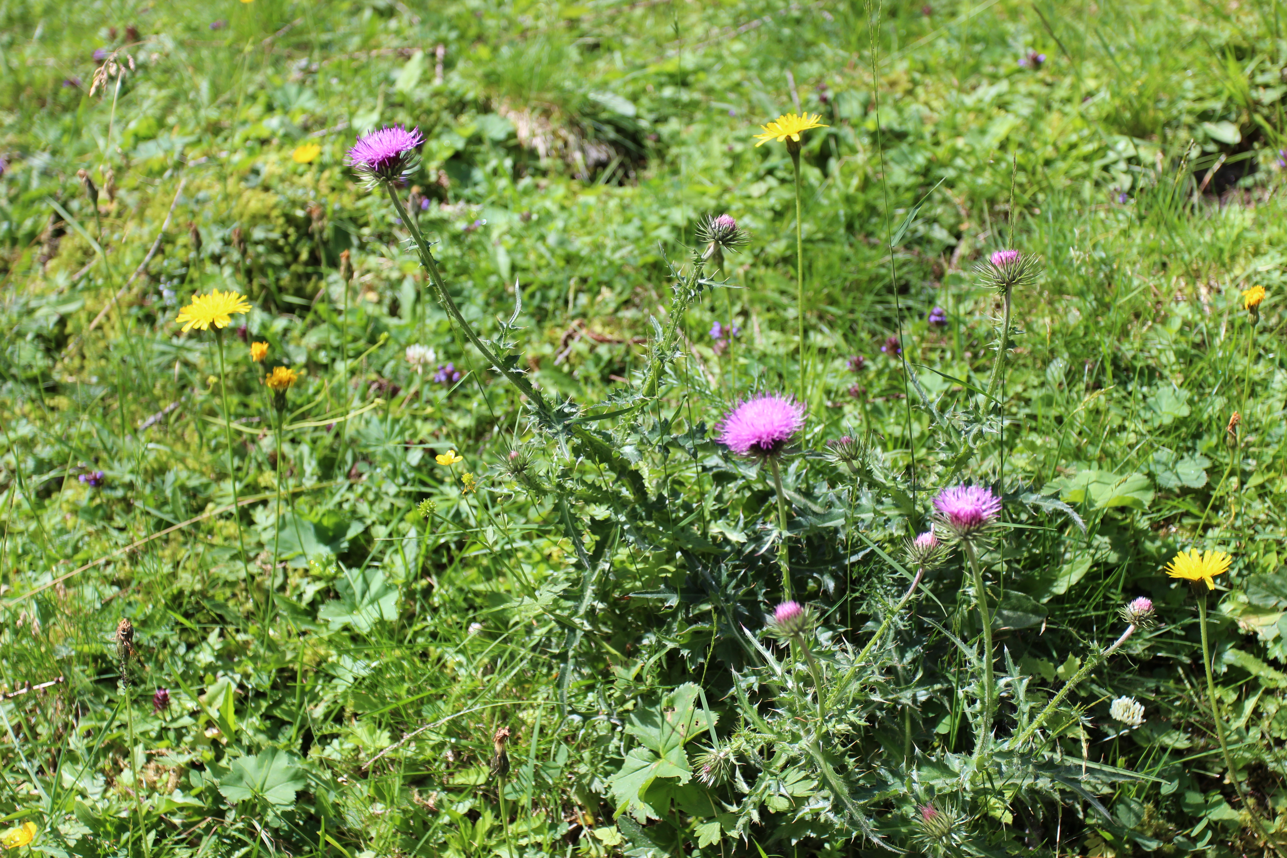 Carduus defloratus subsp. tridentinus